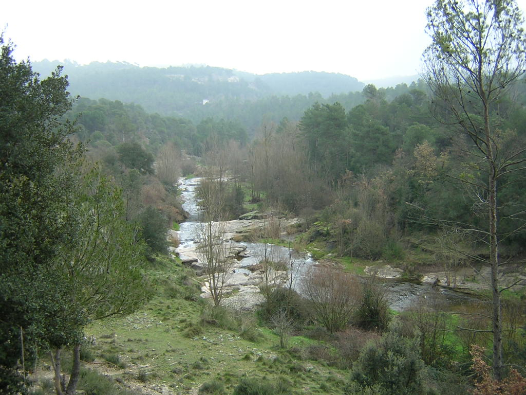 El Trull (Monistrol de Calders, Moianès)